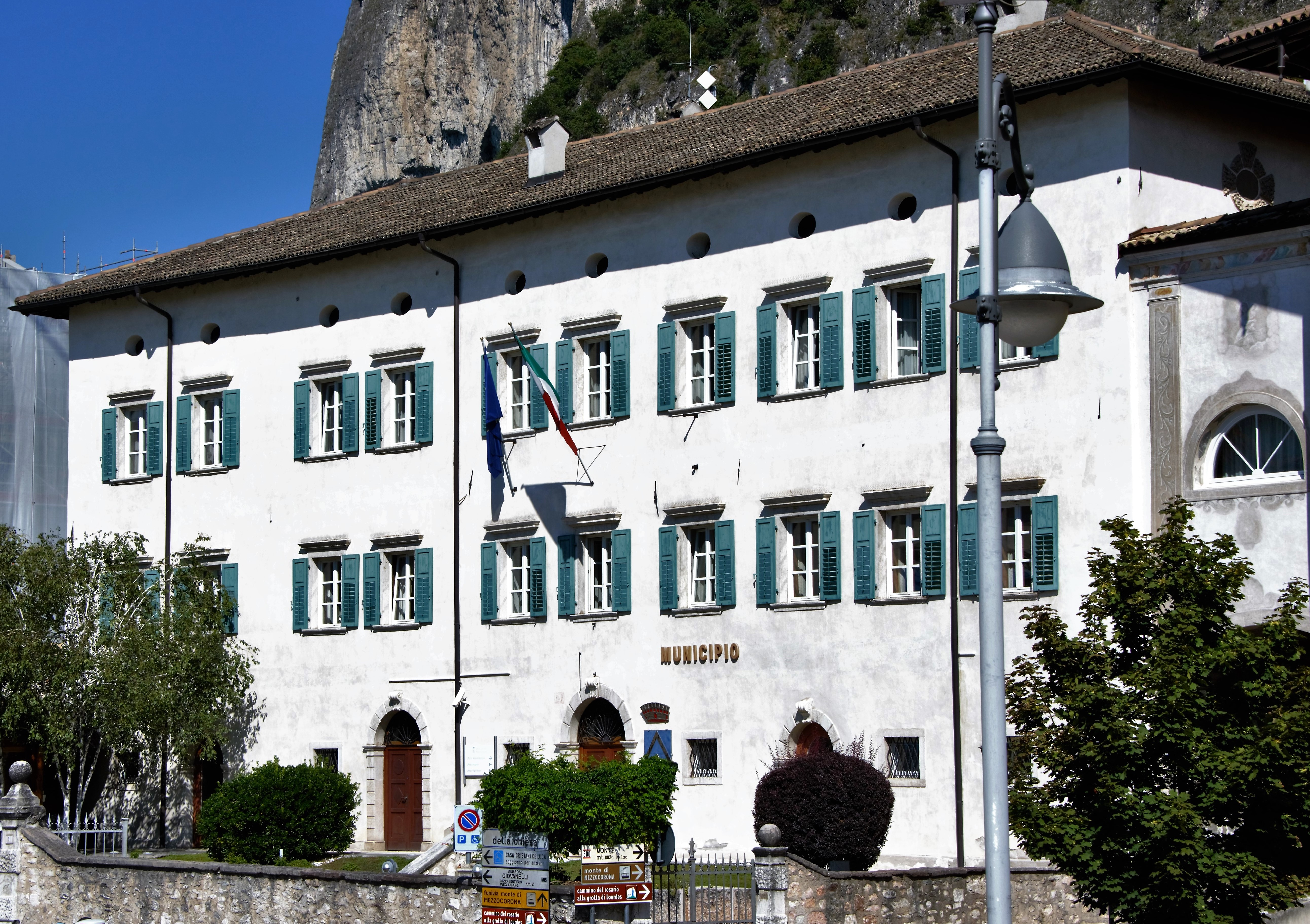 Palazzo FIRMIAN This is a photo of a monument which is part of cultural heritage of Italy.